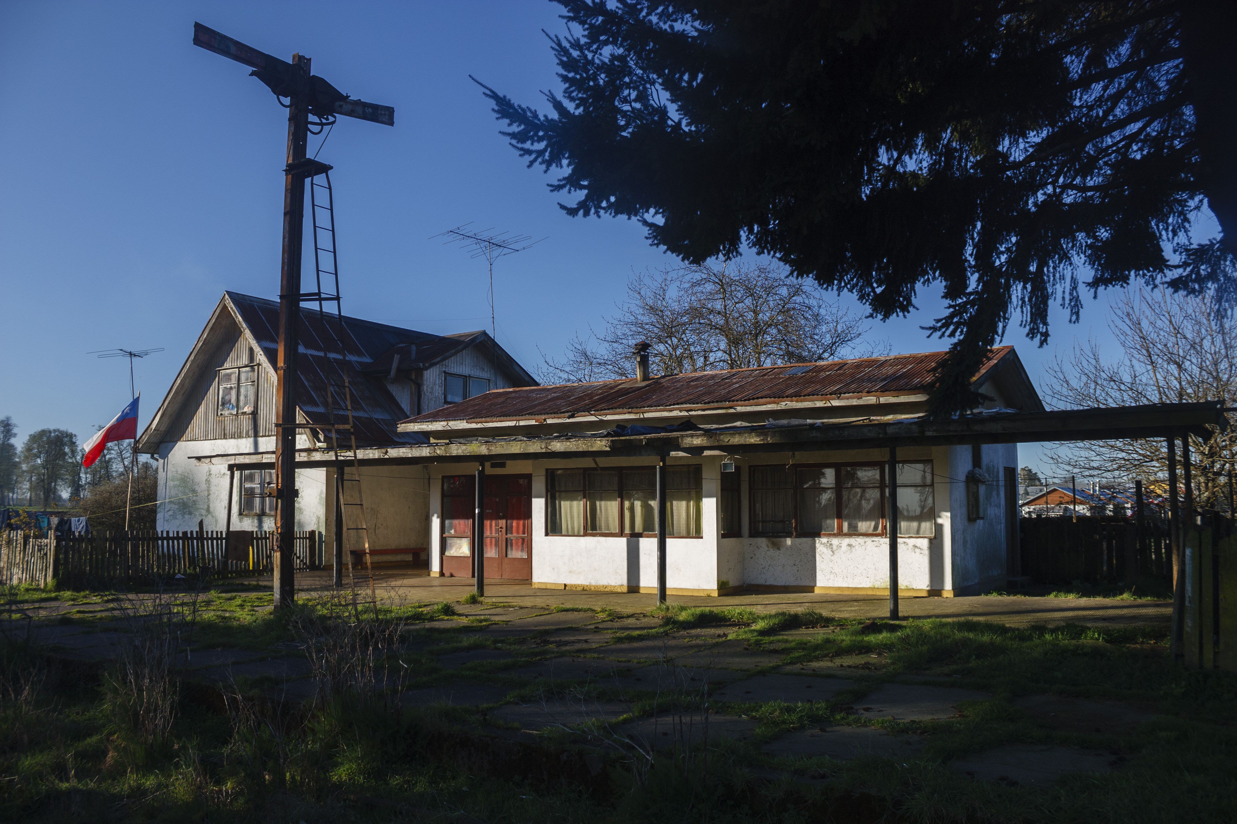 Estación Casma, Región de Los Lagos, 2011.